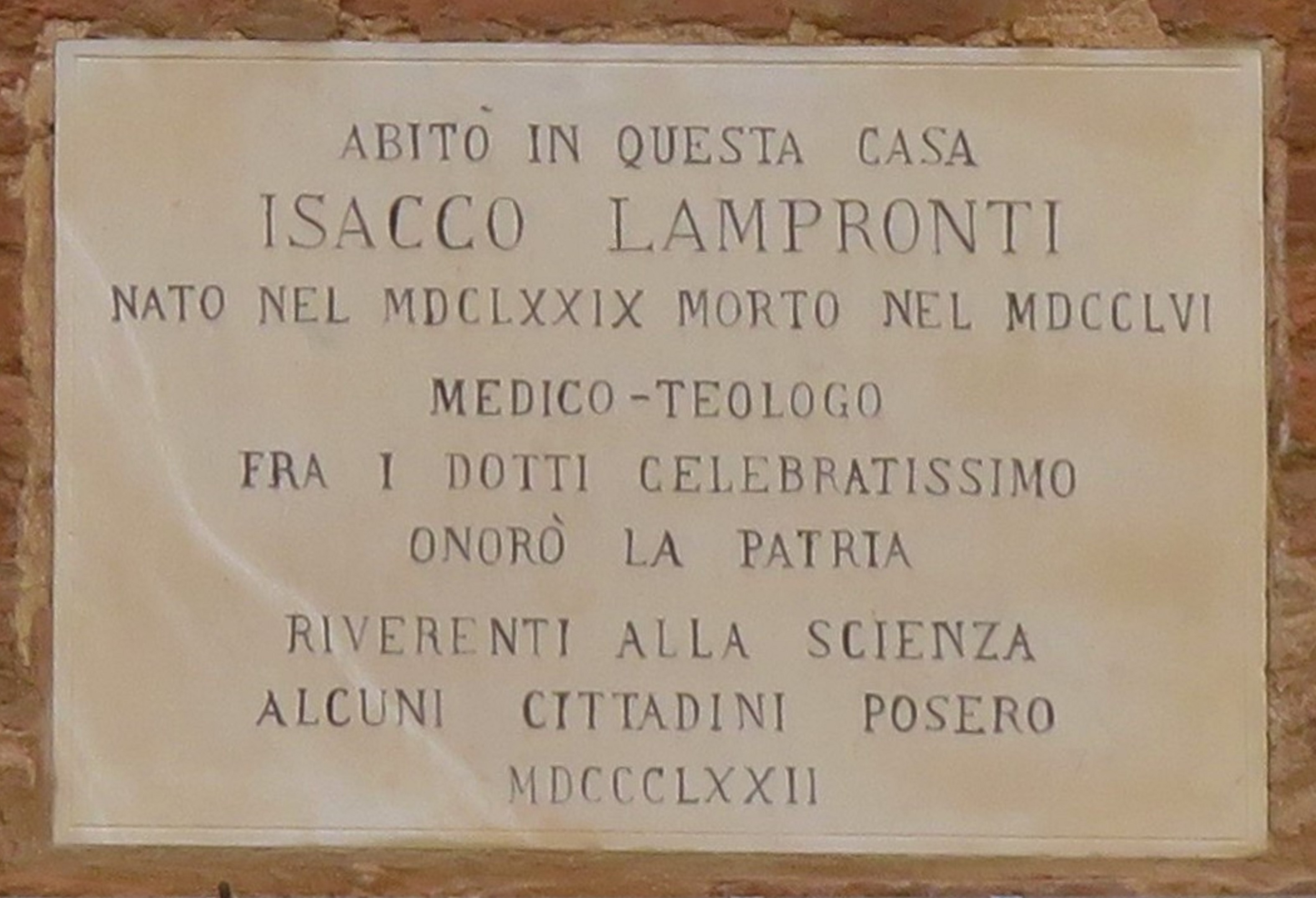 ABITO' IN QUESTA CASAISACCO LAMPRONTINATO NEL MDCLXXIX MORTO NEL MDCCLVIMEDICO-TEOLOGOFRA I DOTTI CELEBRATISSIMOONORO' LA PATRIARIVERENTI ALLA SCIENZAALCUNI CITTADINI POSEROMDCCCLXXII